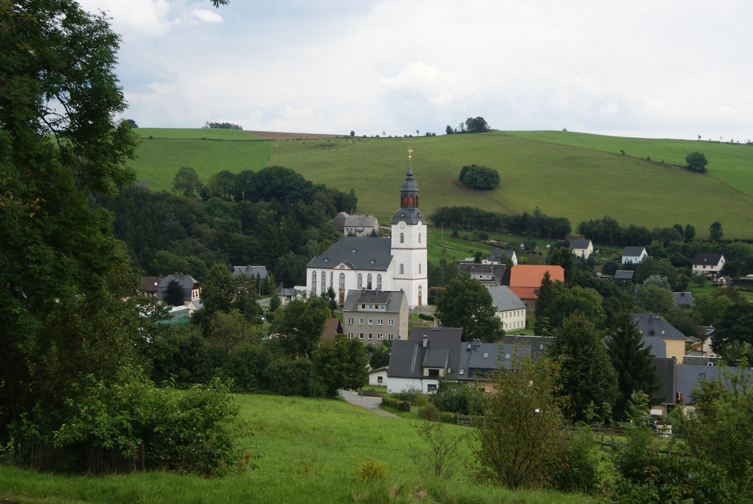 Kirche Drebach von der Venusberger Straße